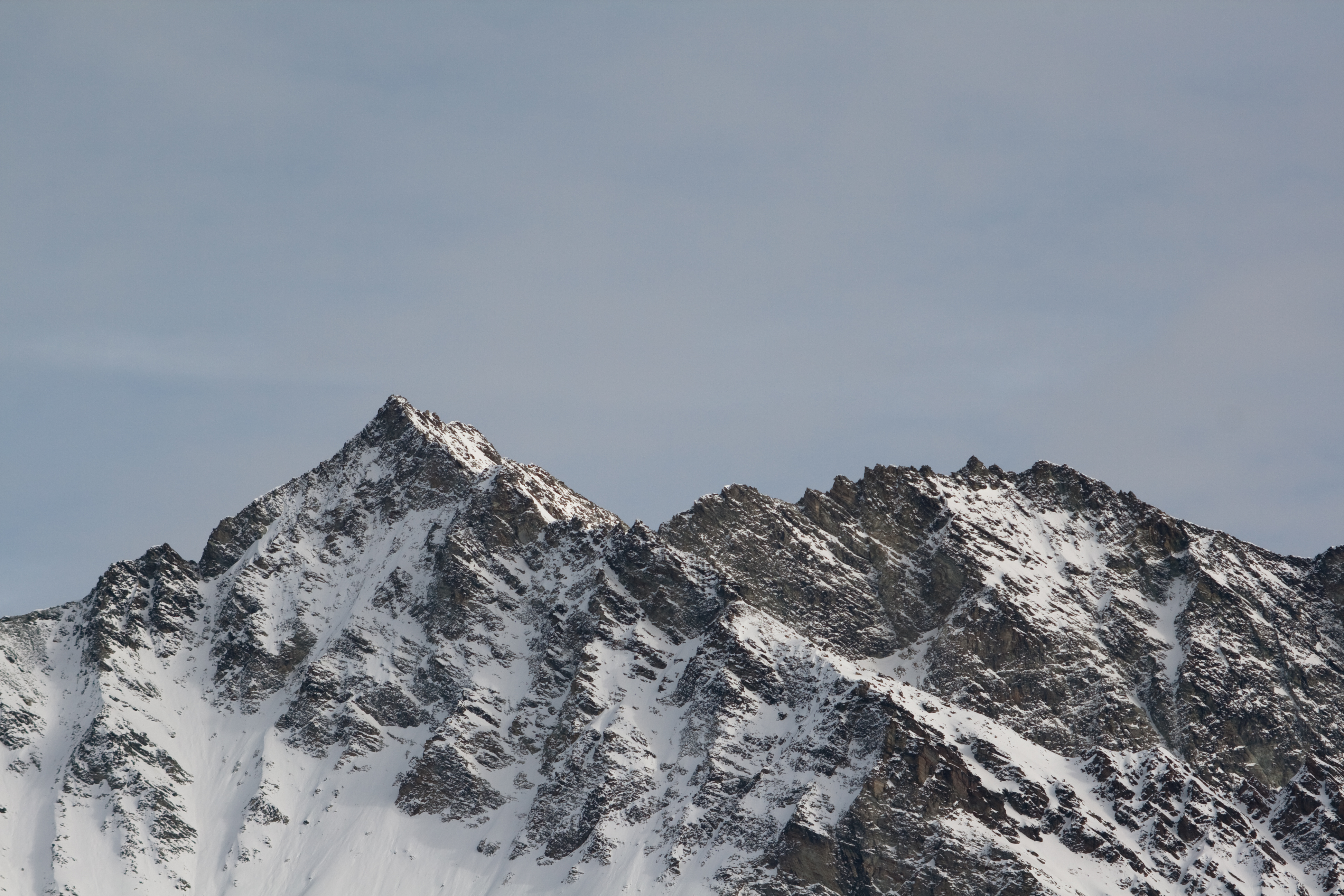 Les Diablons dans les Alpes valaisannes, vu depuis les pentes de la Corne de Sorebois.